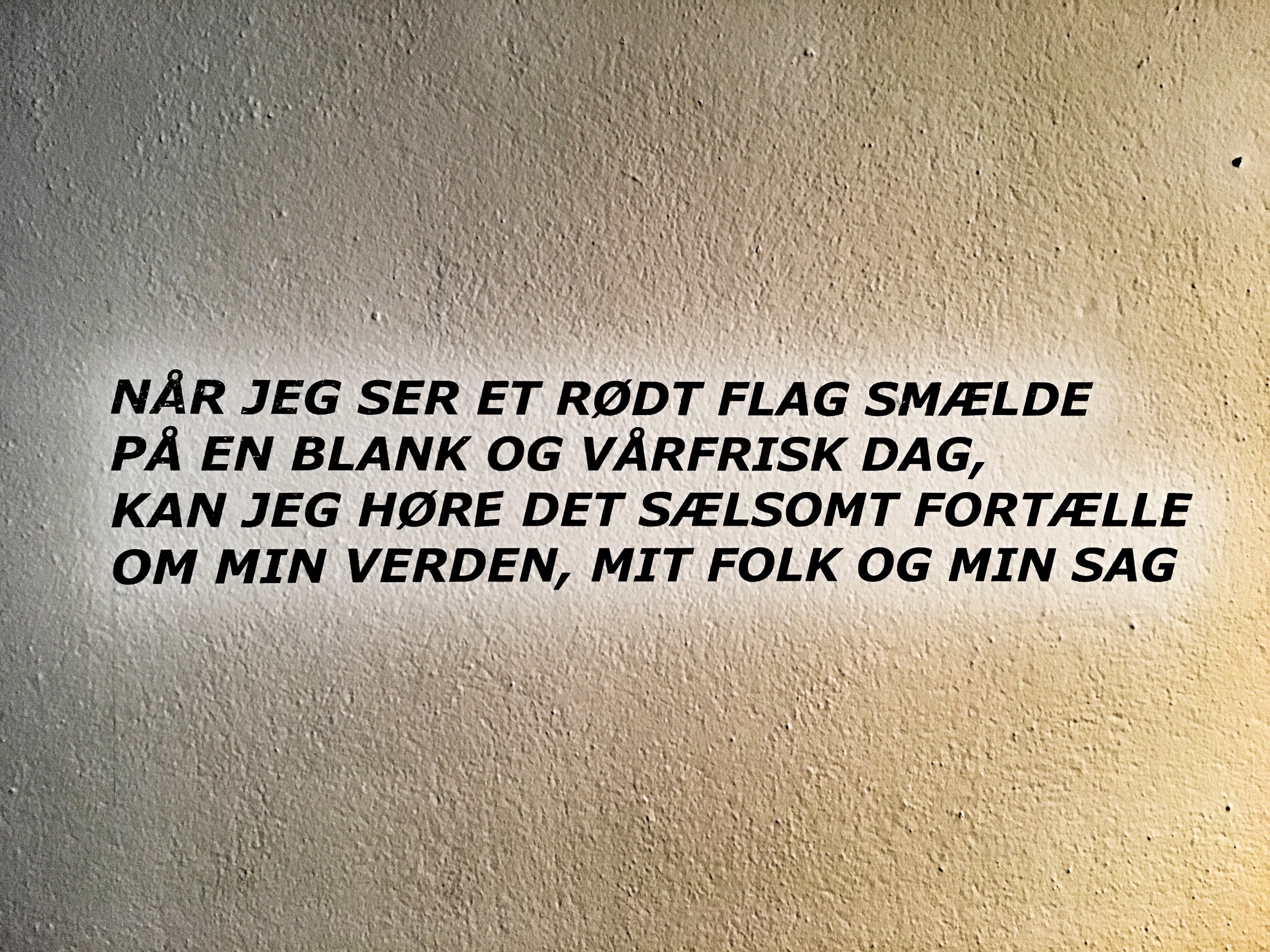 Strofe fra sang skrevet til et DSU Københavns kredsstævne i 1923